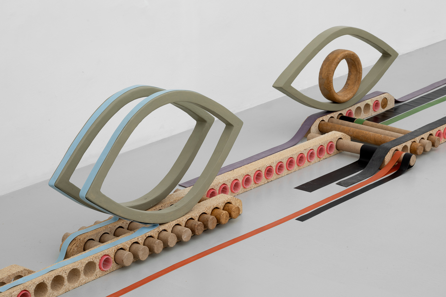 "קשר עין" - פסל